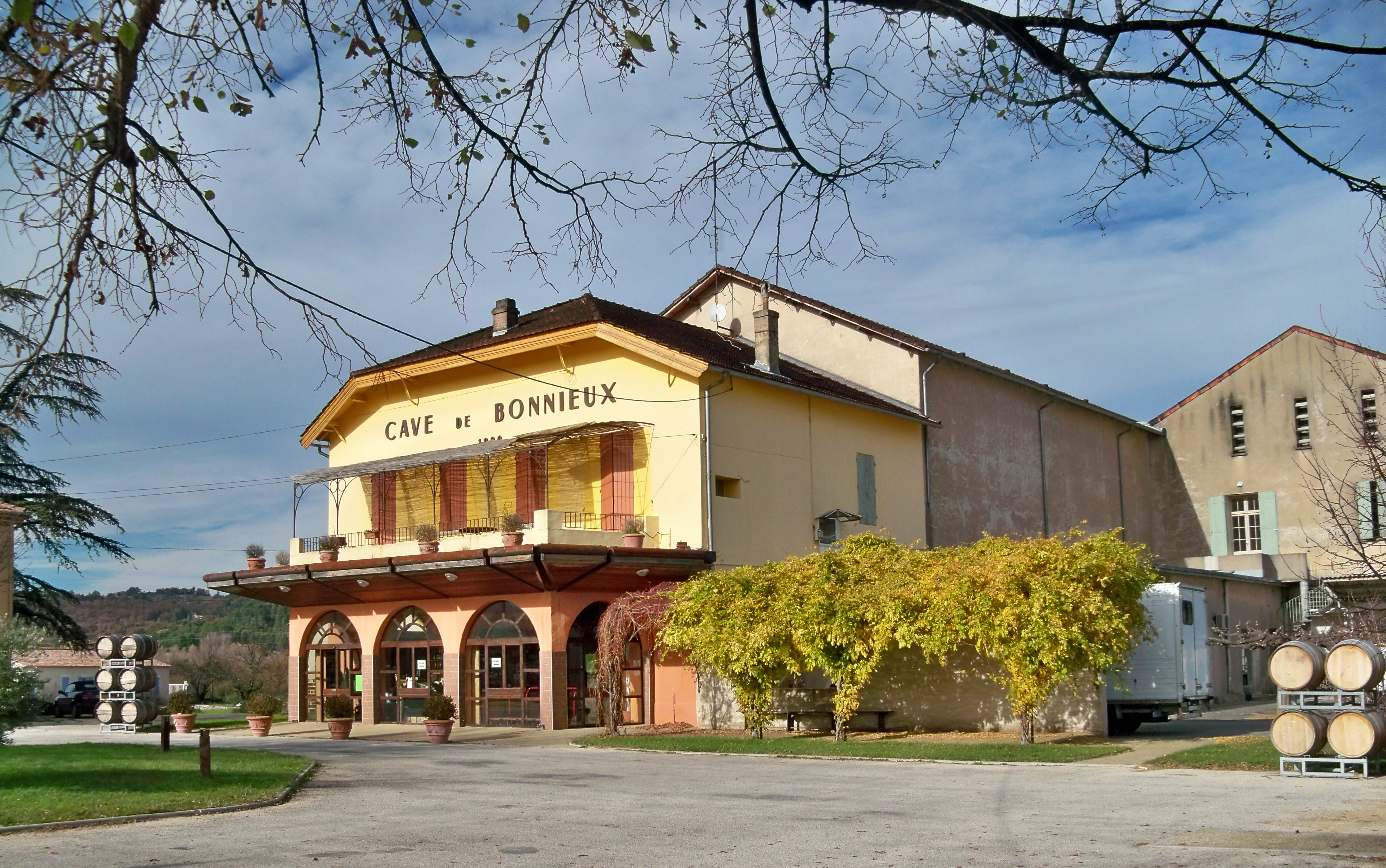 Cave coopérative de Bonnieux, Vaucluse, France